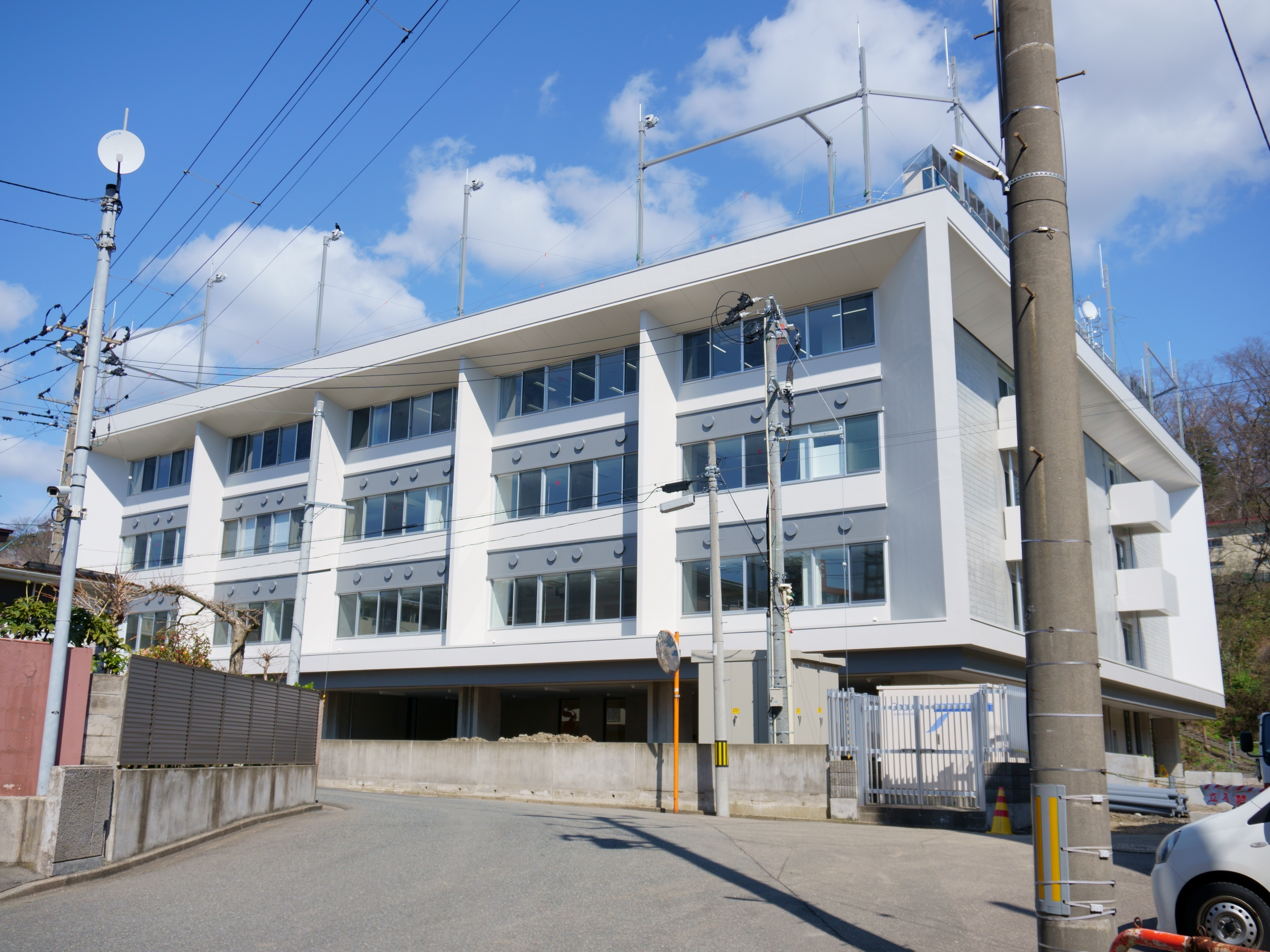 秋田令和高等学校（旧秋田和洋女子高等学校）。2020年に新校舎が竣工したのに合わせ、共学化し校名も変更した。